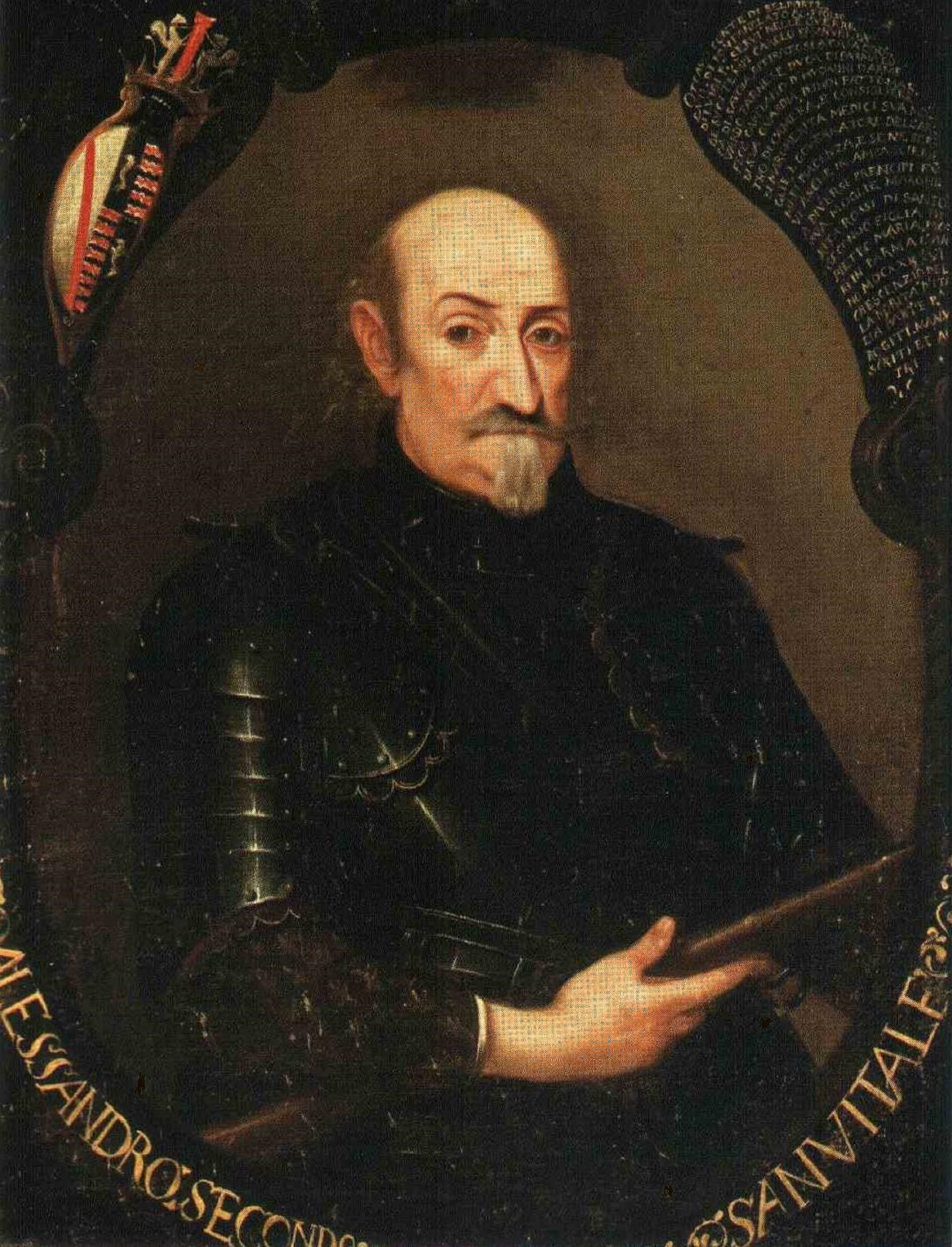 Il conte Alessandro II Sanvitale (ca. 1573-1646).